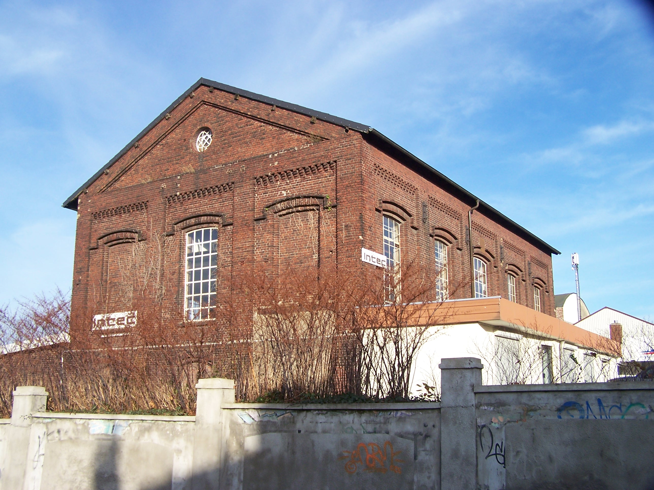 Fördermaschinenhaus (erbaut vor 1880) der Zeche Vereinigte Bickefeld Tiefbau, Schachtanlage Martin (auch Neu-Bickefeld genannt), an der Erlenbachstraße/Bickefeldstraße in Dortmund-Aplerbeck